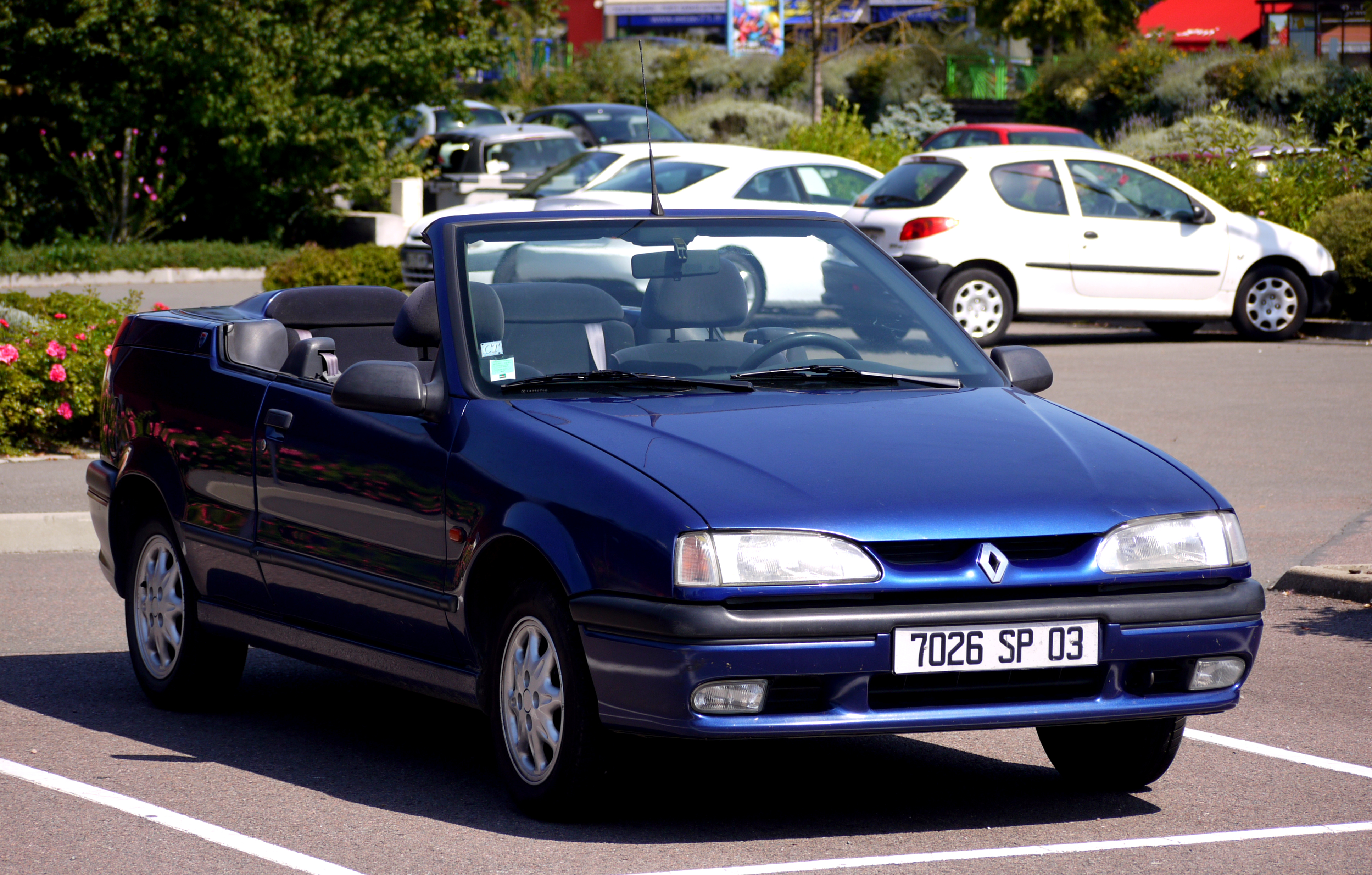 1995 Renault 19 1.8i "Aria" convertible.